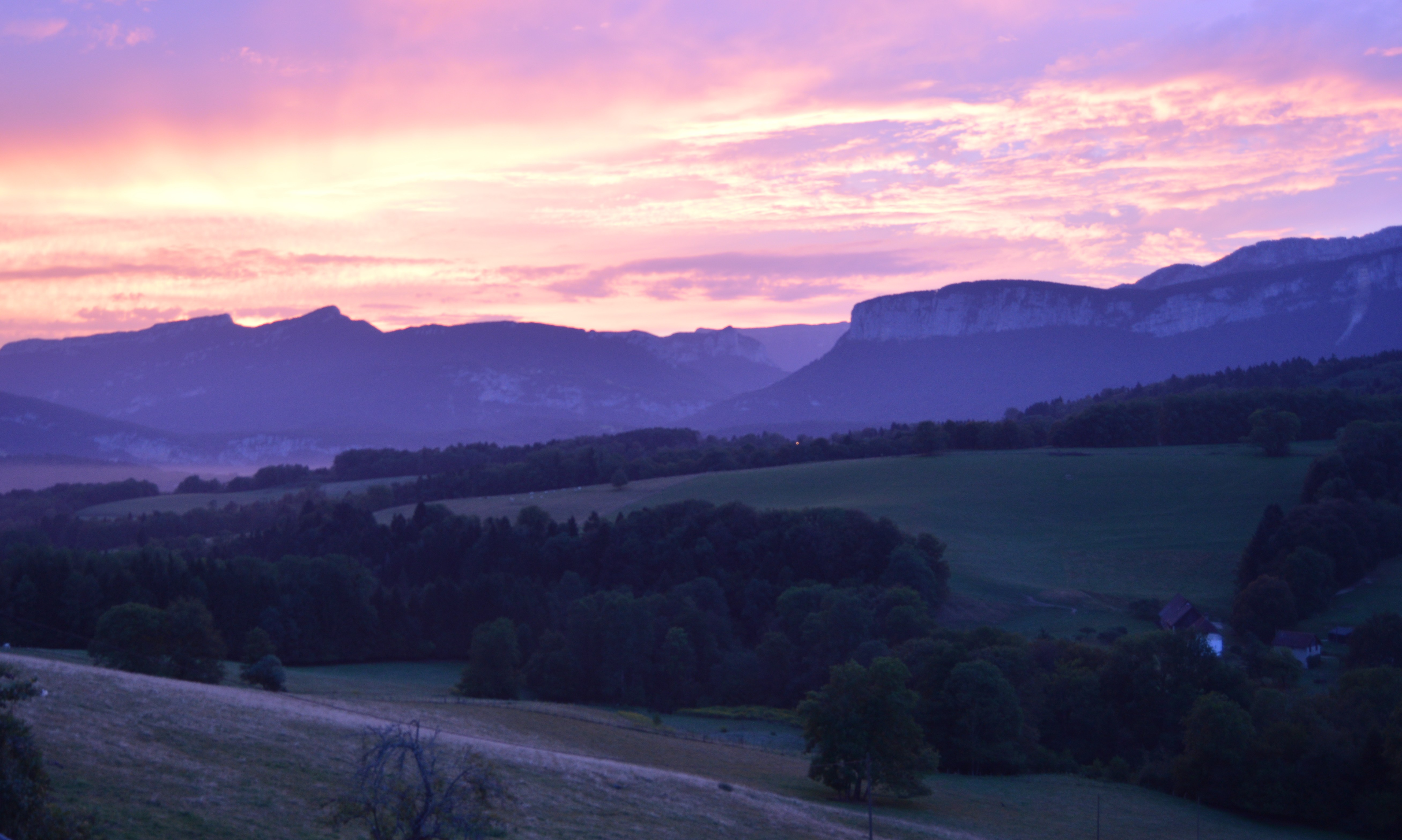 Miribel-les-Echelles, surnommée "le balcon de Chartreuse" pour sa vue imprenable sur le massif